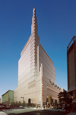 東京宝塚ビル